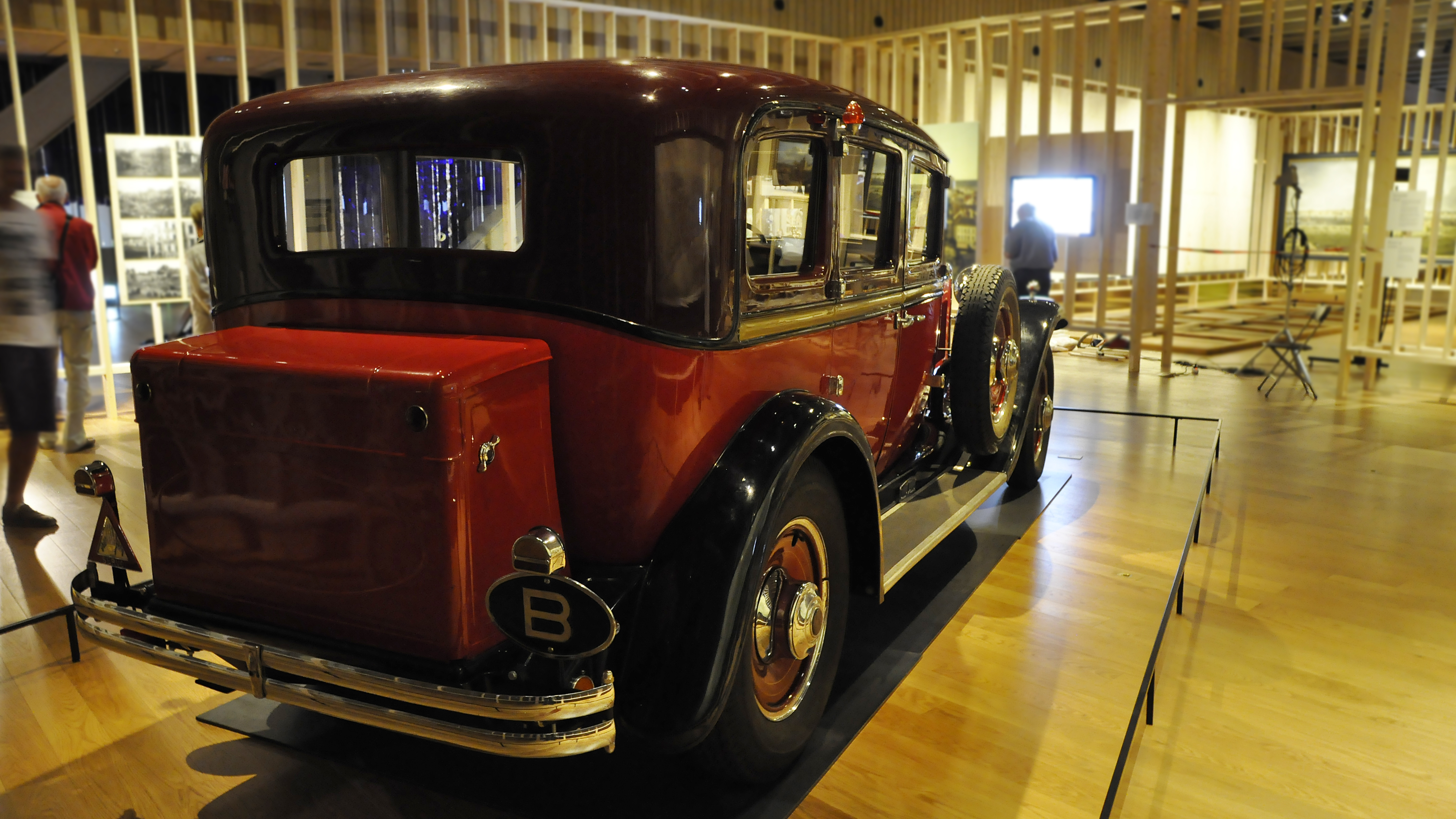 Een Minerva 17cv M6 type AR uit 1932 in het MAS te Antwerpen